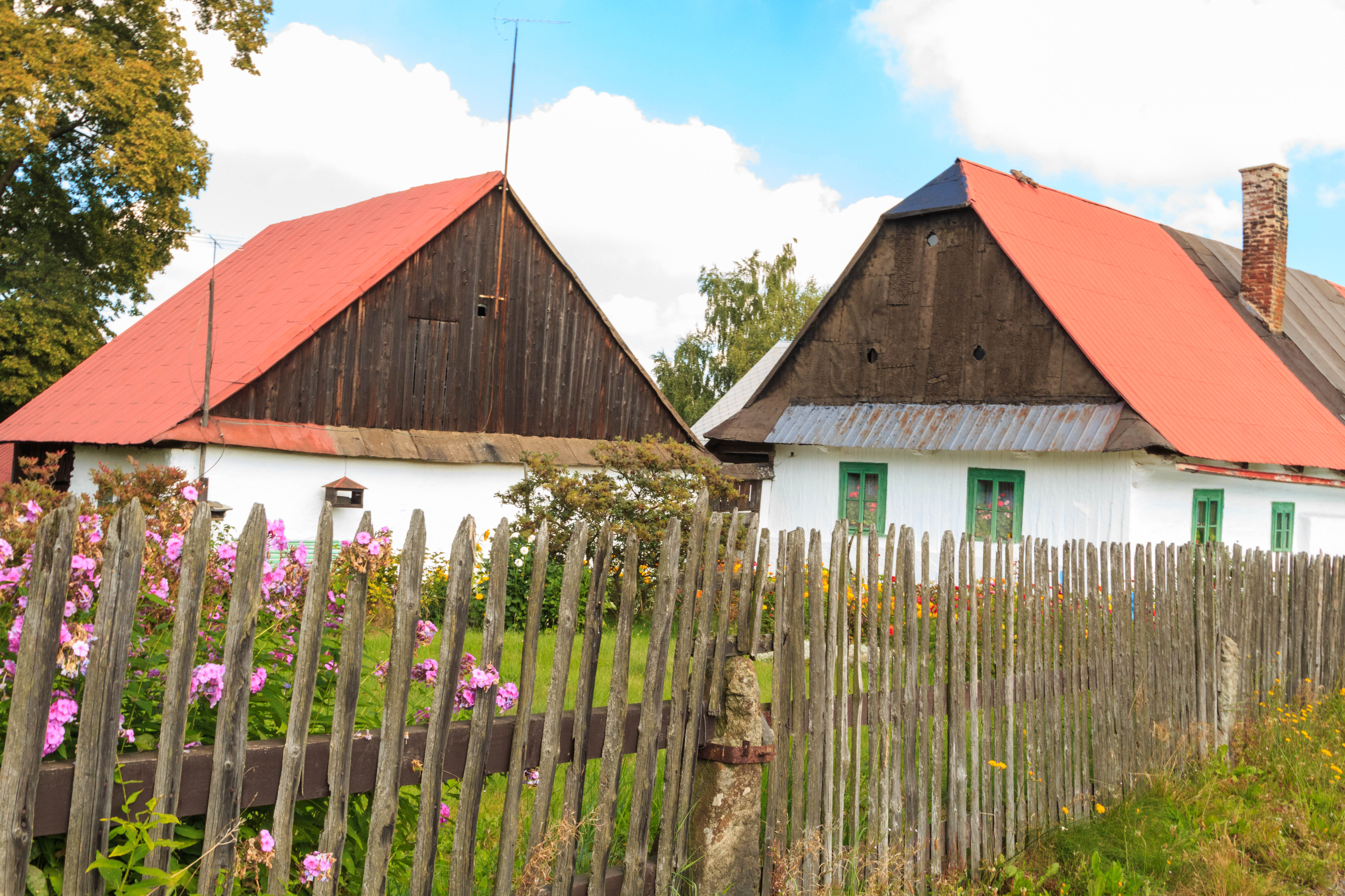 Horní Holetín - č. 2